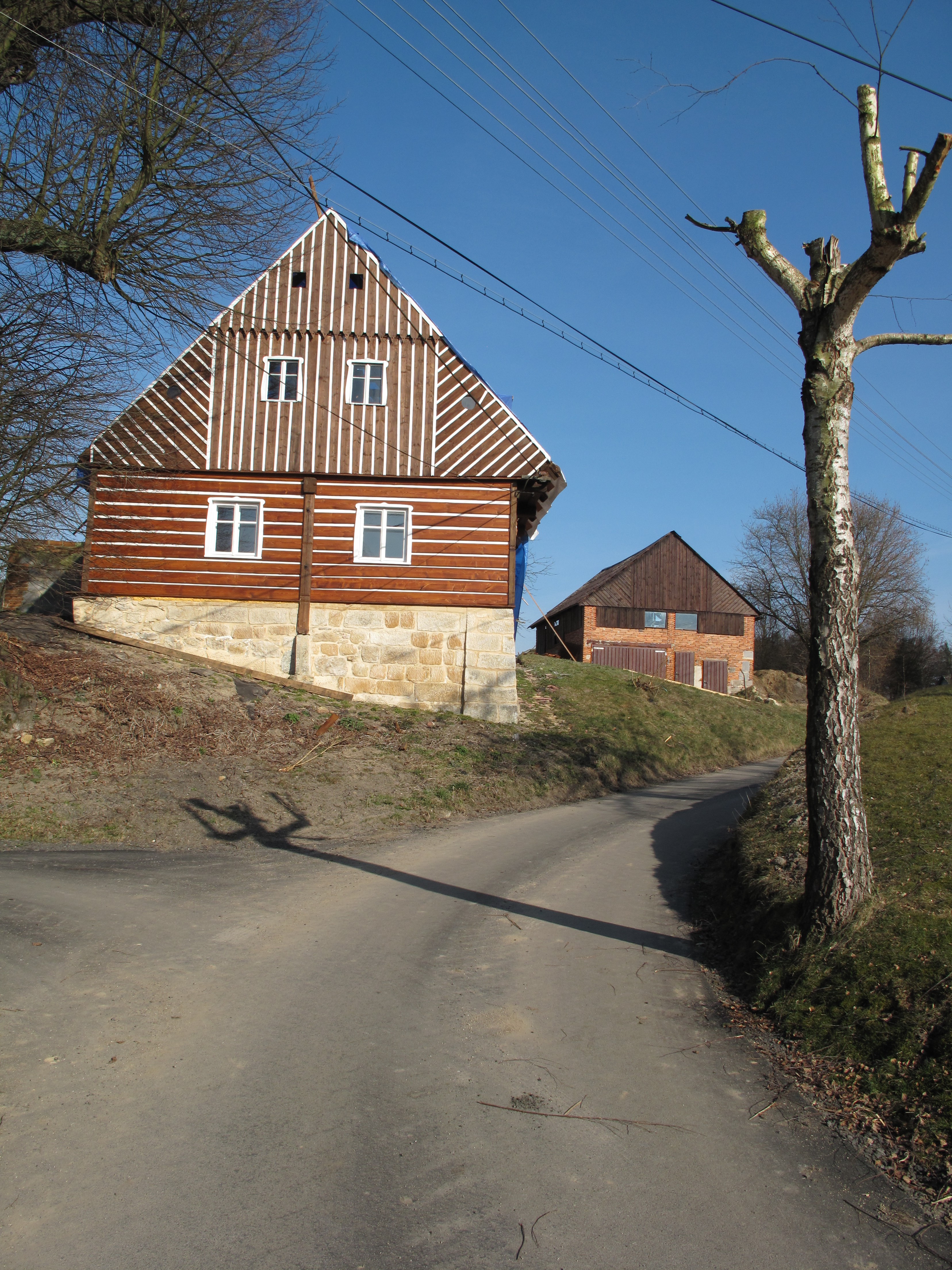 Roubenka ve Všelibicích. Okres Liberec, Česká republika.